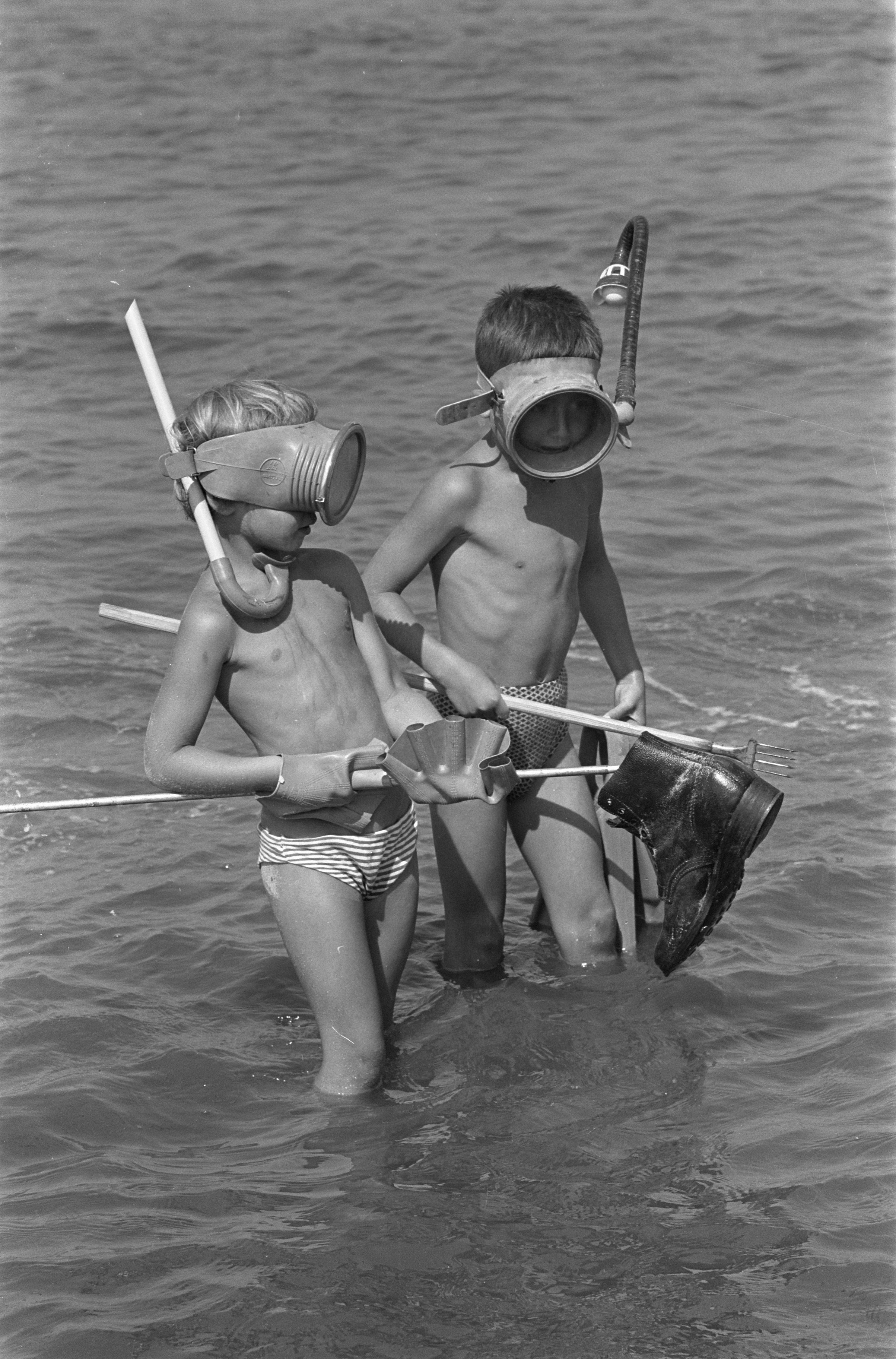 Collectie / Archief : Fotocollectie Anefo Reportage / Serie : [ onbekend ] Beschrijving : Zwemmen langs het Noordzeestrand met snorkel en zwemvliezen Datum : 20 augustus 1959 Fotograaf : Pot, Harry / Anefo Auteursrechthebbende : Nationaal Archief Materiaalsoort : Negatief (zwart/wit) Nummer archiefinventaris : bekijk toegang 2.24.01.05 Bestanddeelnummer : 910-6178